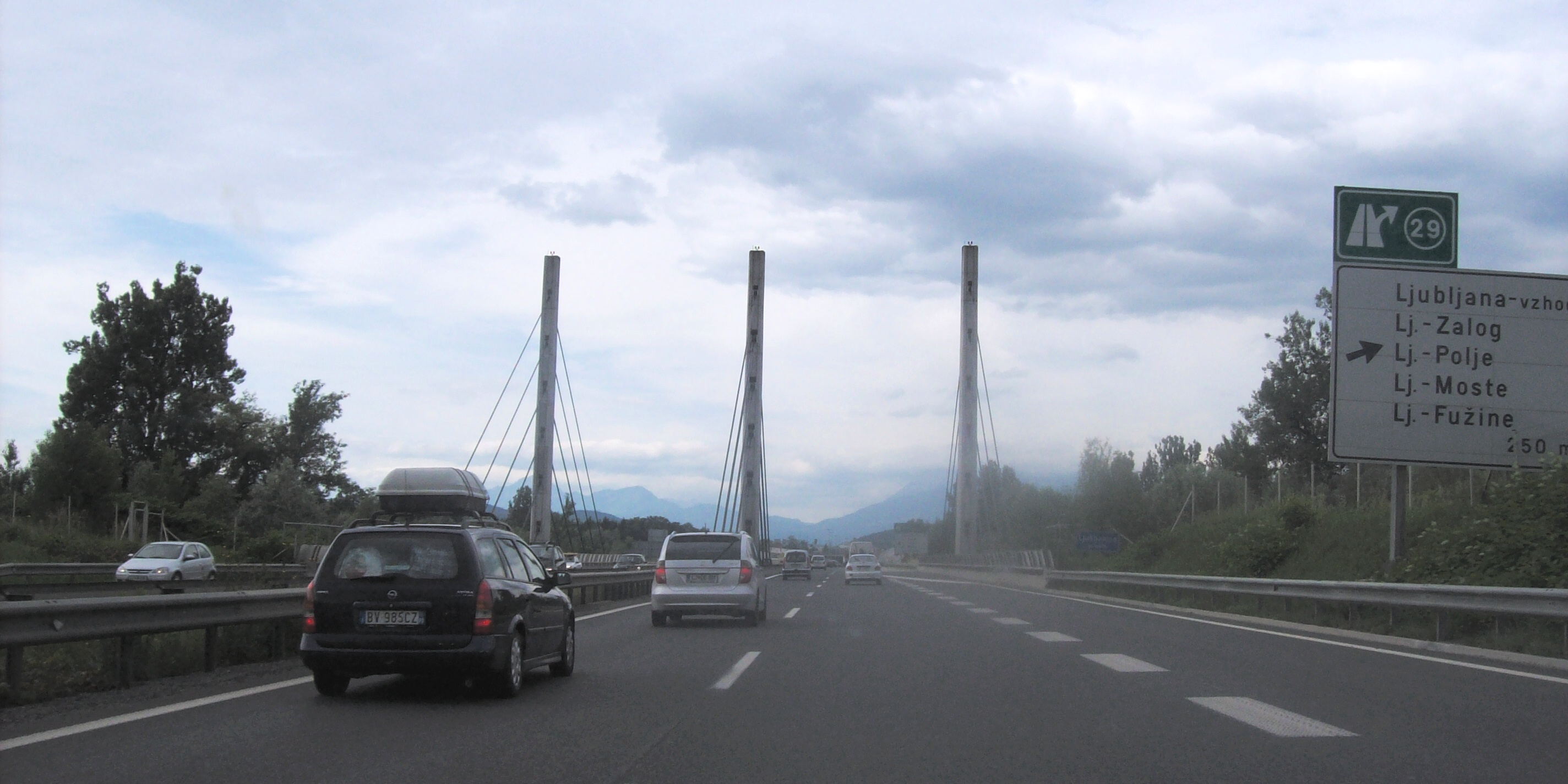 Ljubljanica bridge, A1 motorway, Slovenia